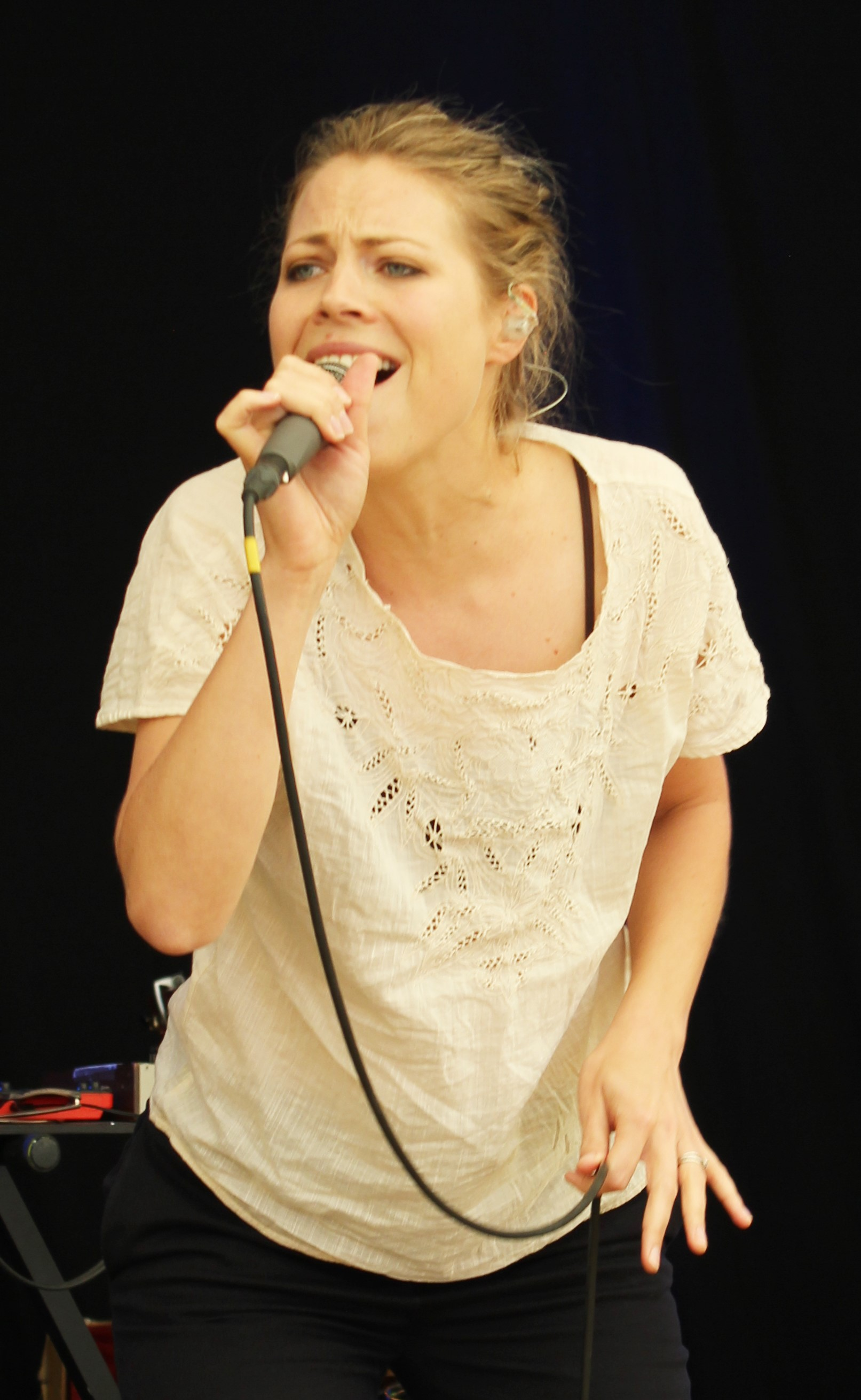 Die Berner Sängerin Jaël bei einem Livekonzert (August 2016).